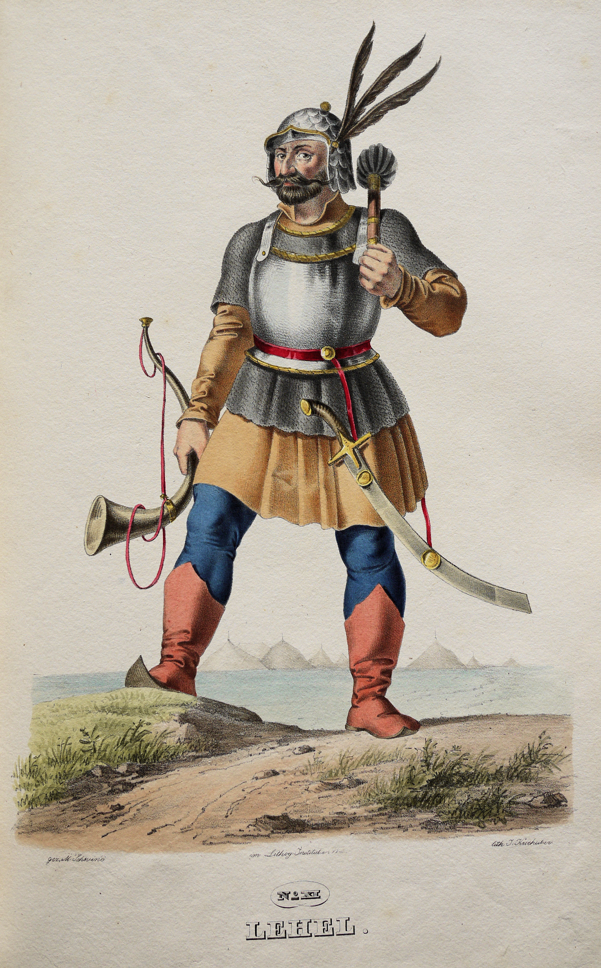 Lehel (gest. 955) ungarischer Heerführer. Lithographie von Josef Kriehuber nach einer Zeichnung von Moritz von Schwind aus Ungerns Erste Heerführer Herzoge und Koenige In einer Reihe von Bildnissen von Bela bis auf Seine Majestät Franz I. Kaiser Von Österreich König Von Ungern &c., &c. Wien : Lithographisches Institut ;ca. 1828